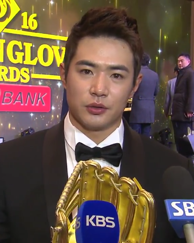 2016 골든글러브 두산 김재환 선수 수상 소감